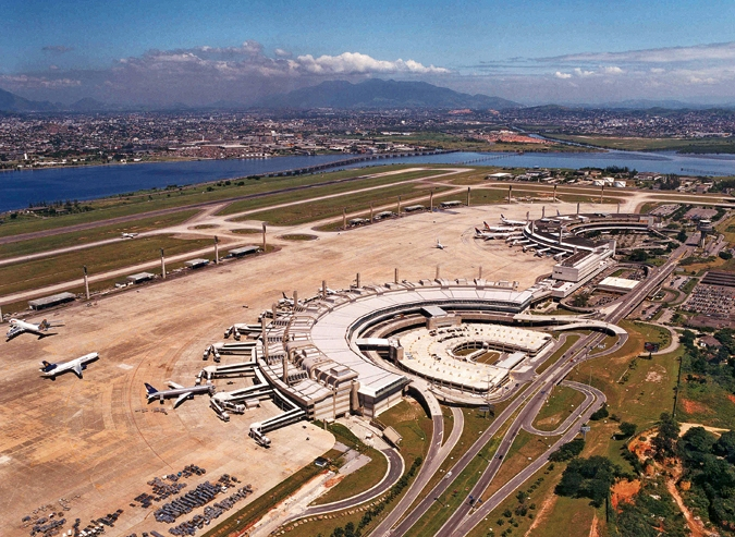 airj aeroporto internacional do mundo rio de janeiro